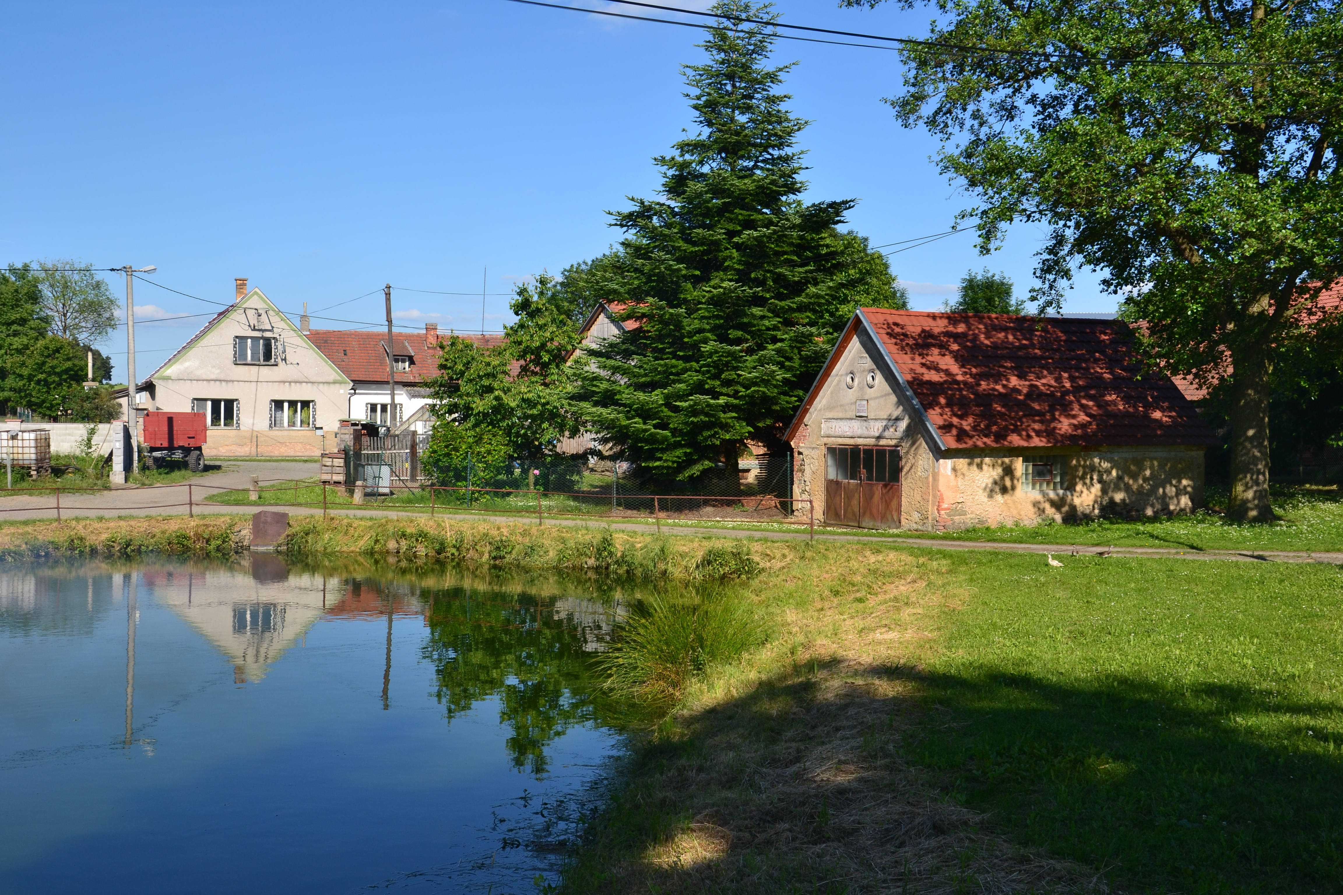 Rybník na návsi